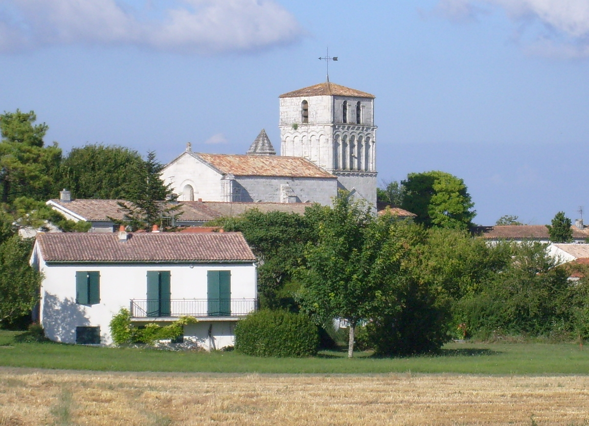 Le village de Saint-Sulpice-de-Royan